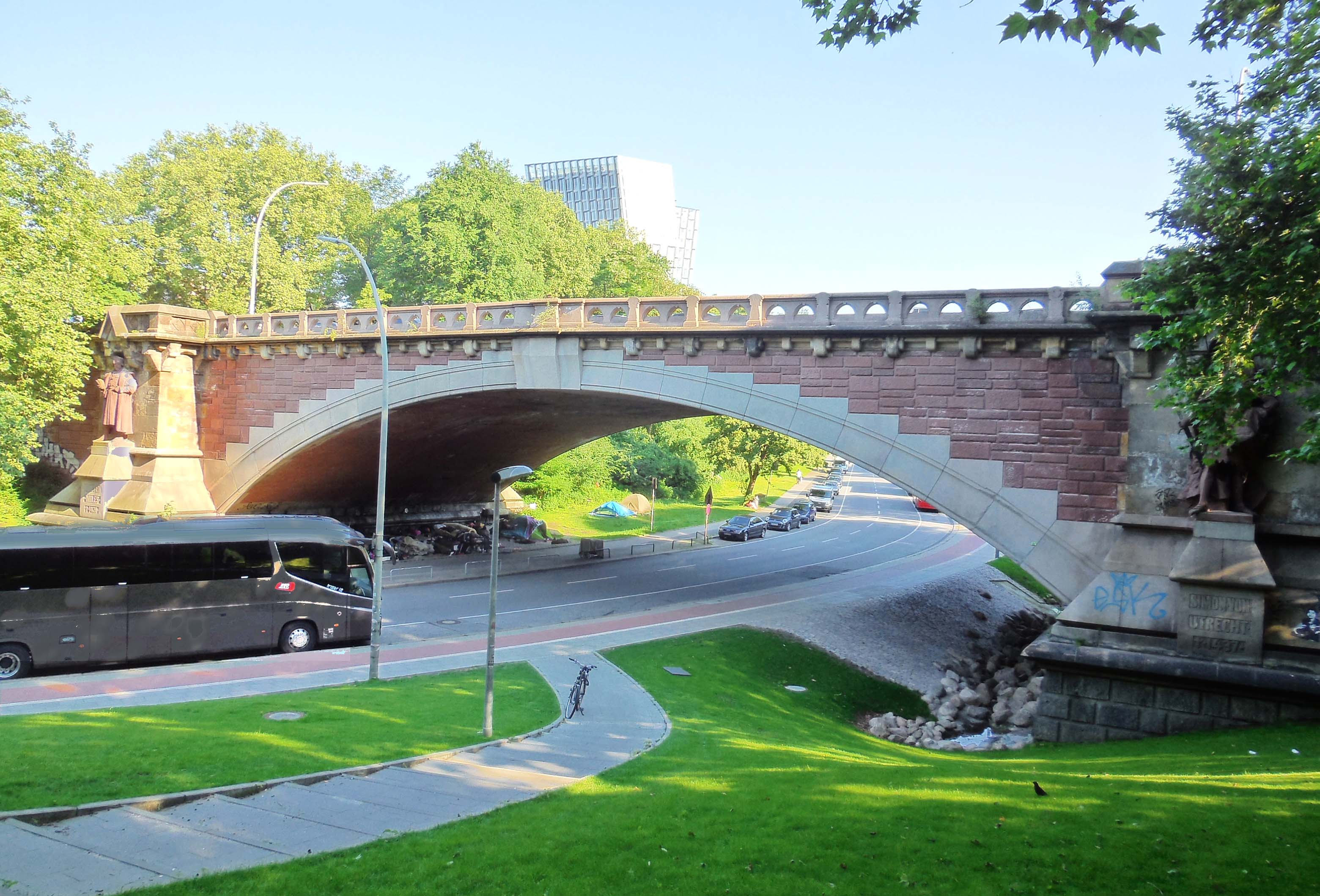 Kersten-Miles-Brücke in Hamburg, Zustand 2016